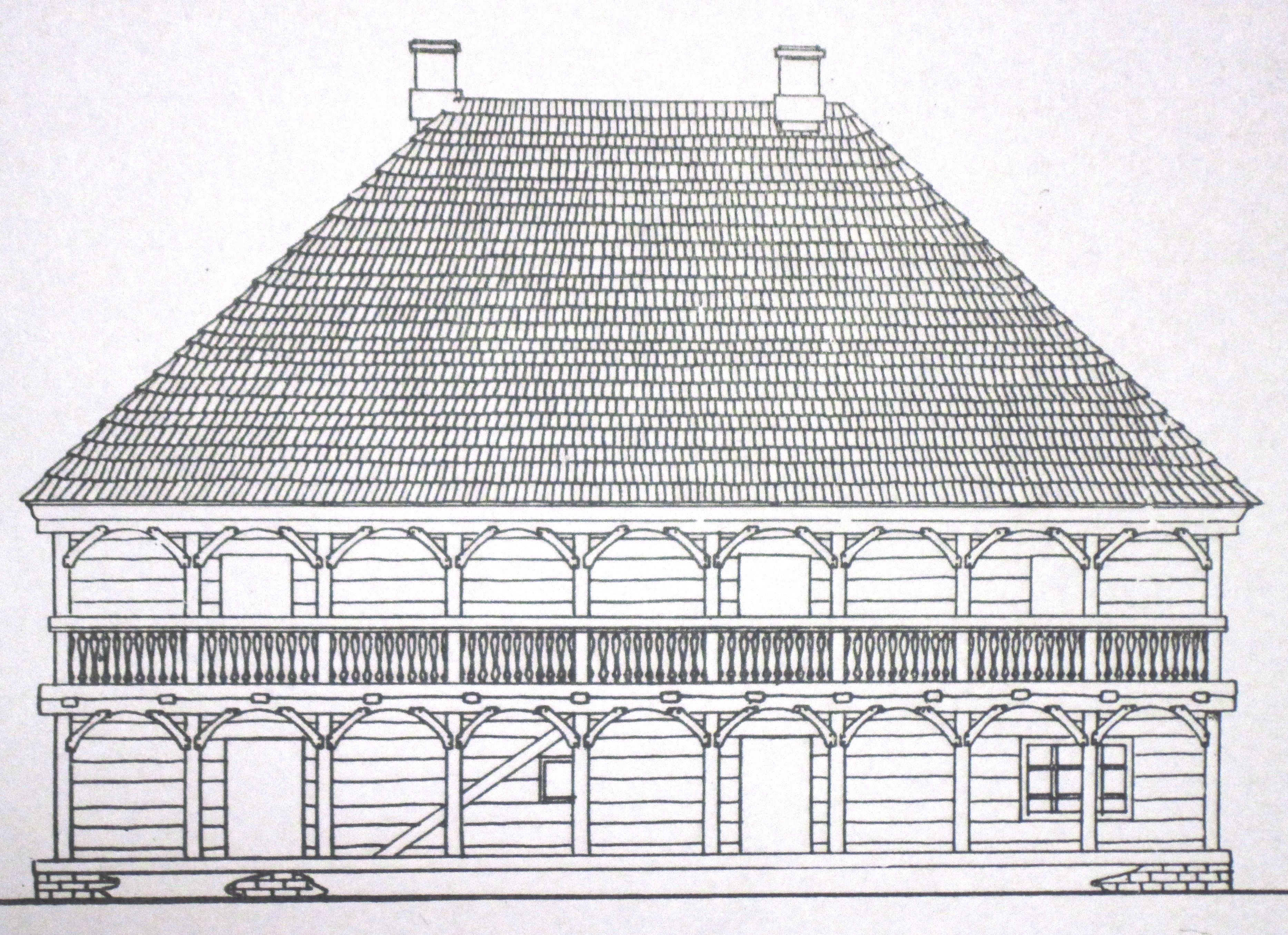 План лямуса брыгіцкага кляштара ў Гродна.